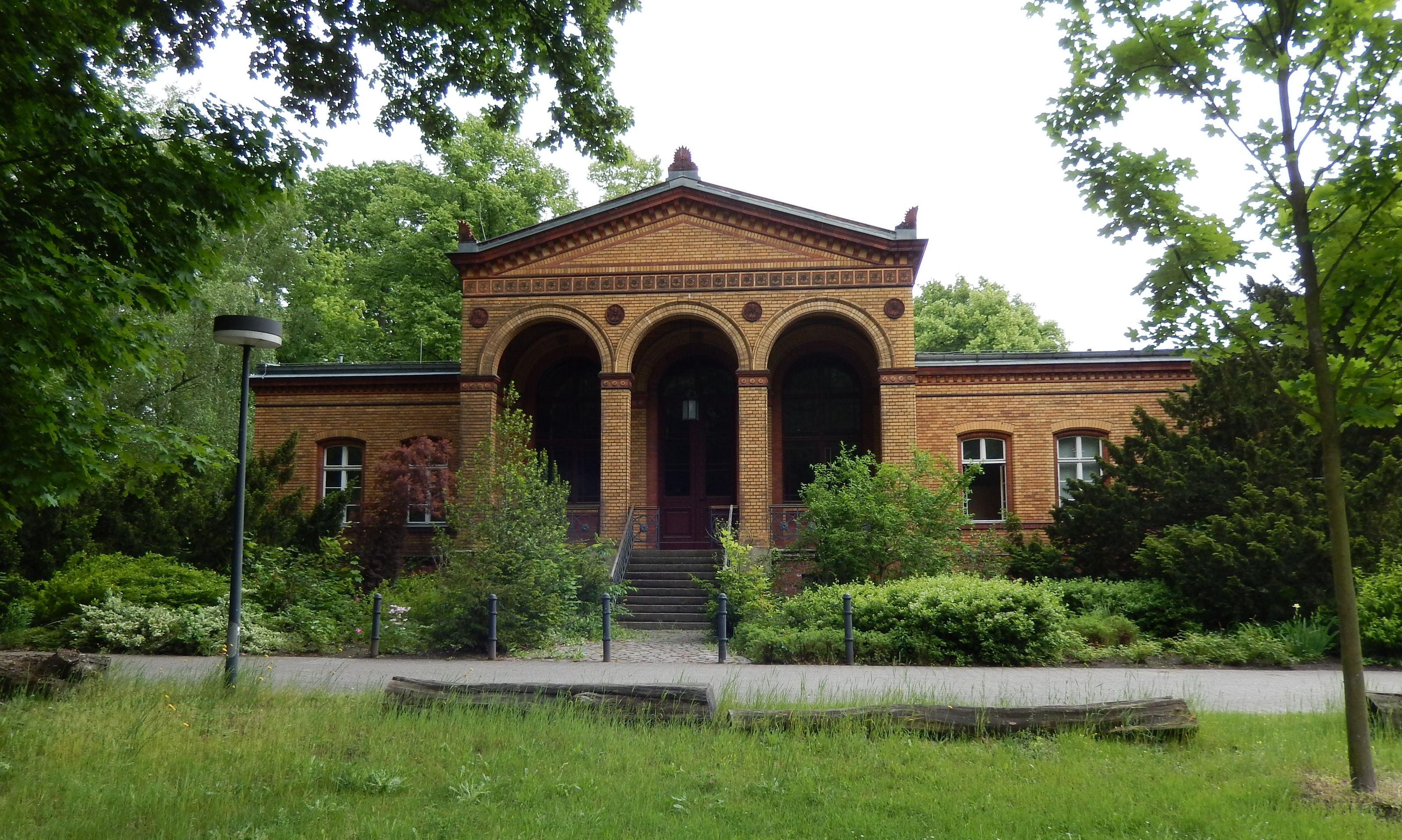 Nordseite der ehemaligen Leichenhalle der Karl-Bonhoeffer-Nervenklinik, vormals Karl-Bonhoeffer-Heilstätten, Wittenauer Heilstätten bzw. Irrenanstalt Dalldorf